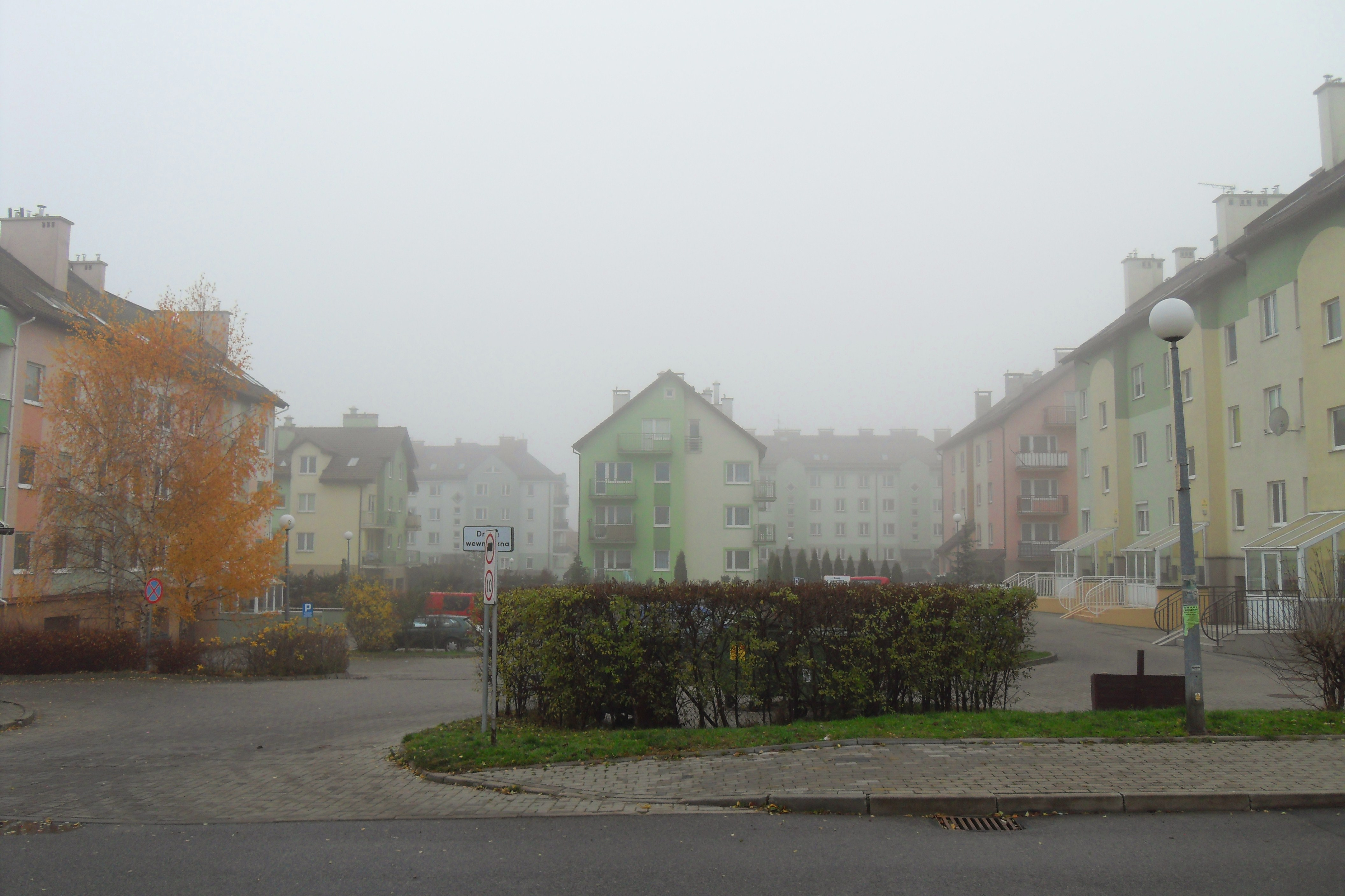 Gdańsk Karczemki, ul. Różany Stok, w tle budynki przy ul. Storczykowej.